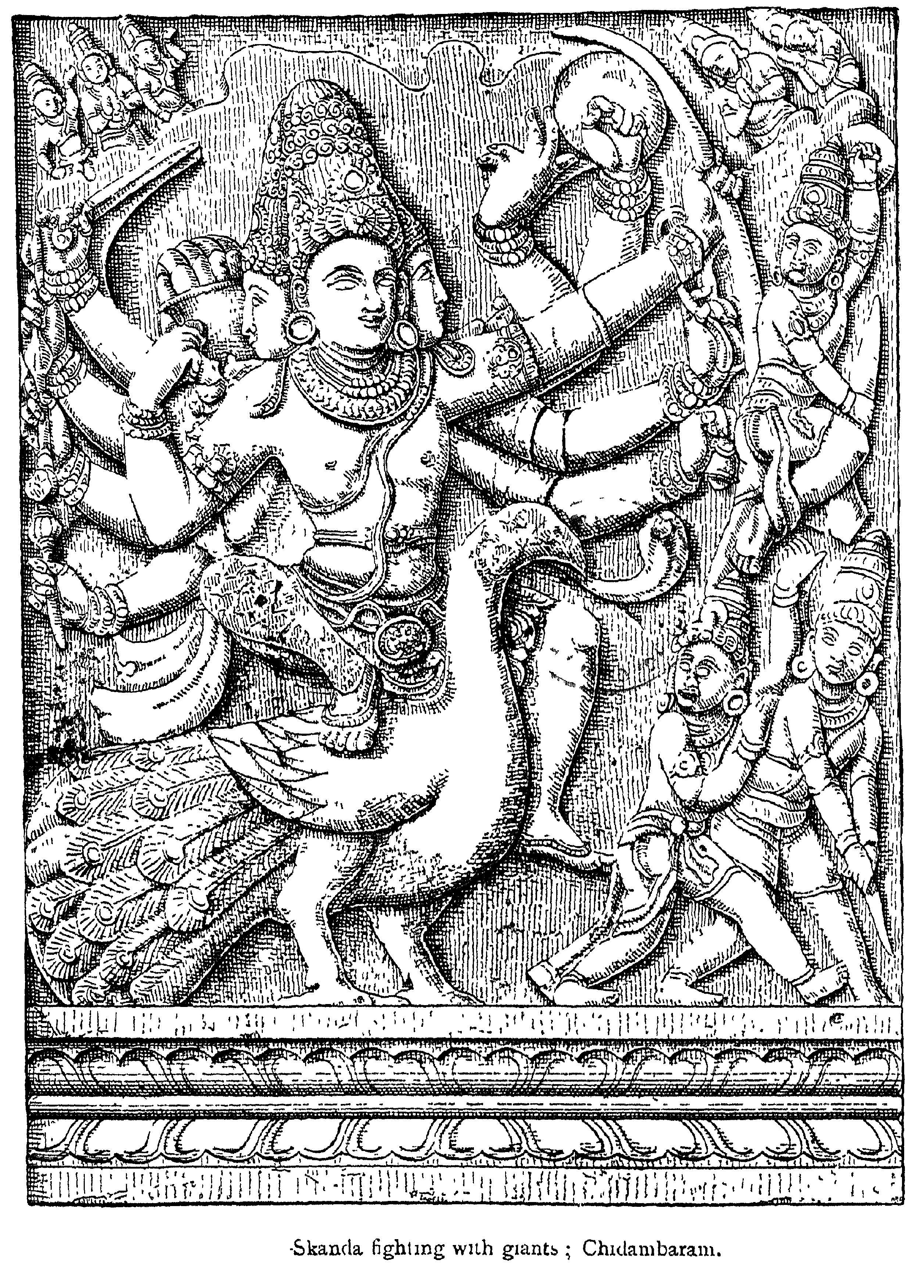 Skanda, Muruga or Karthikeya, from the temple of Chidambaram in Tamil Nadu India